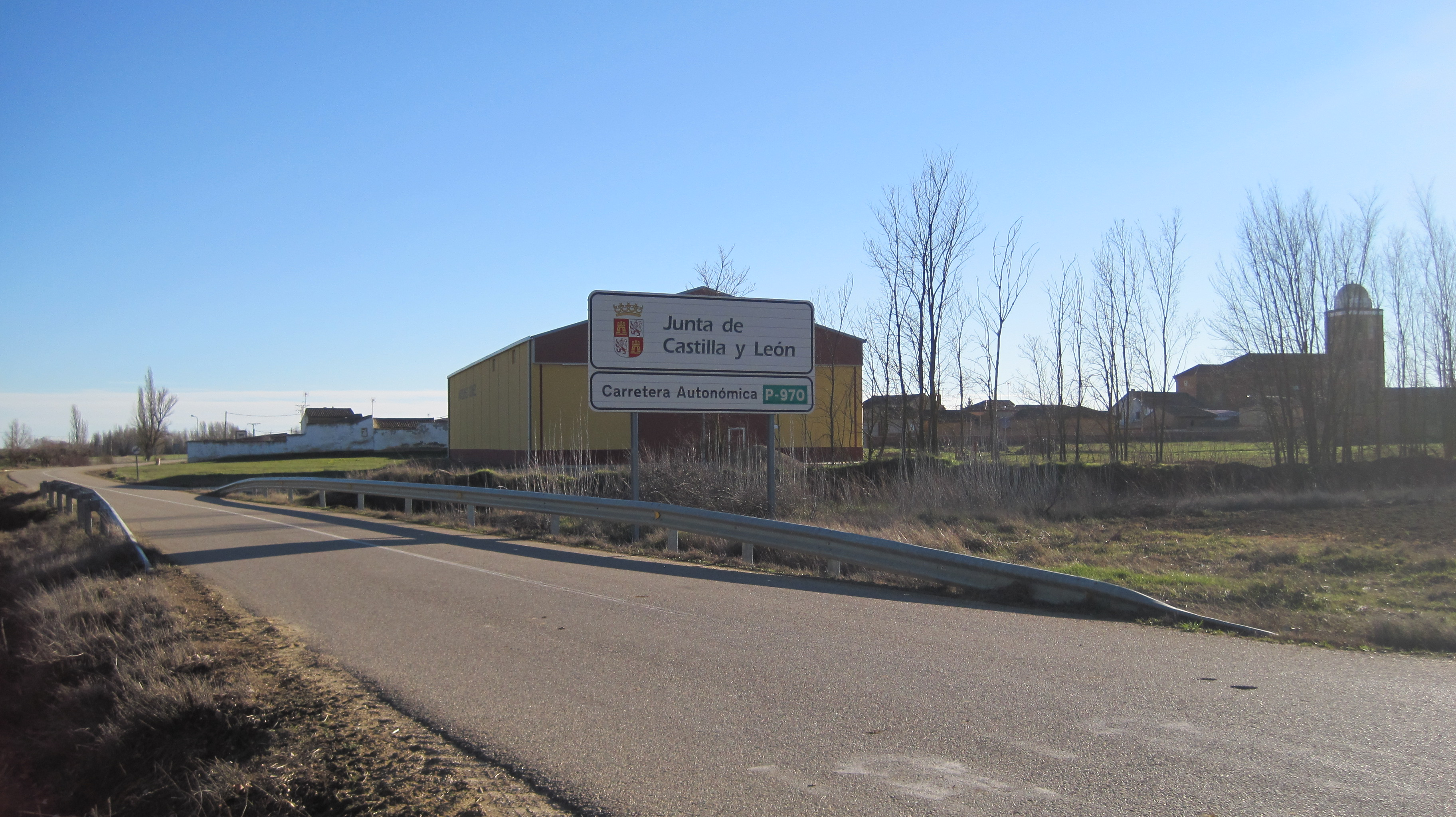 La carretera P-970 a su paso por San Román de la Cuba (Palencia, España).